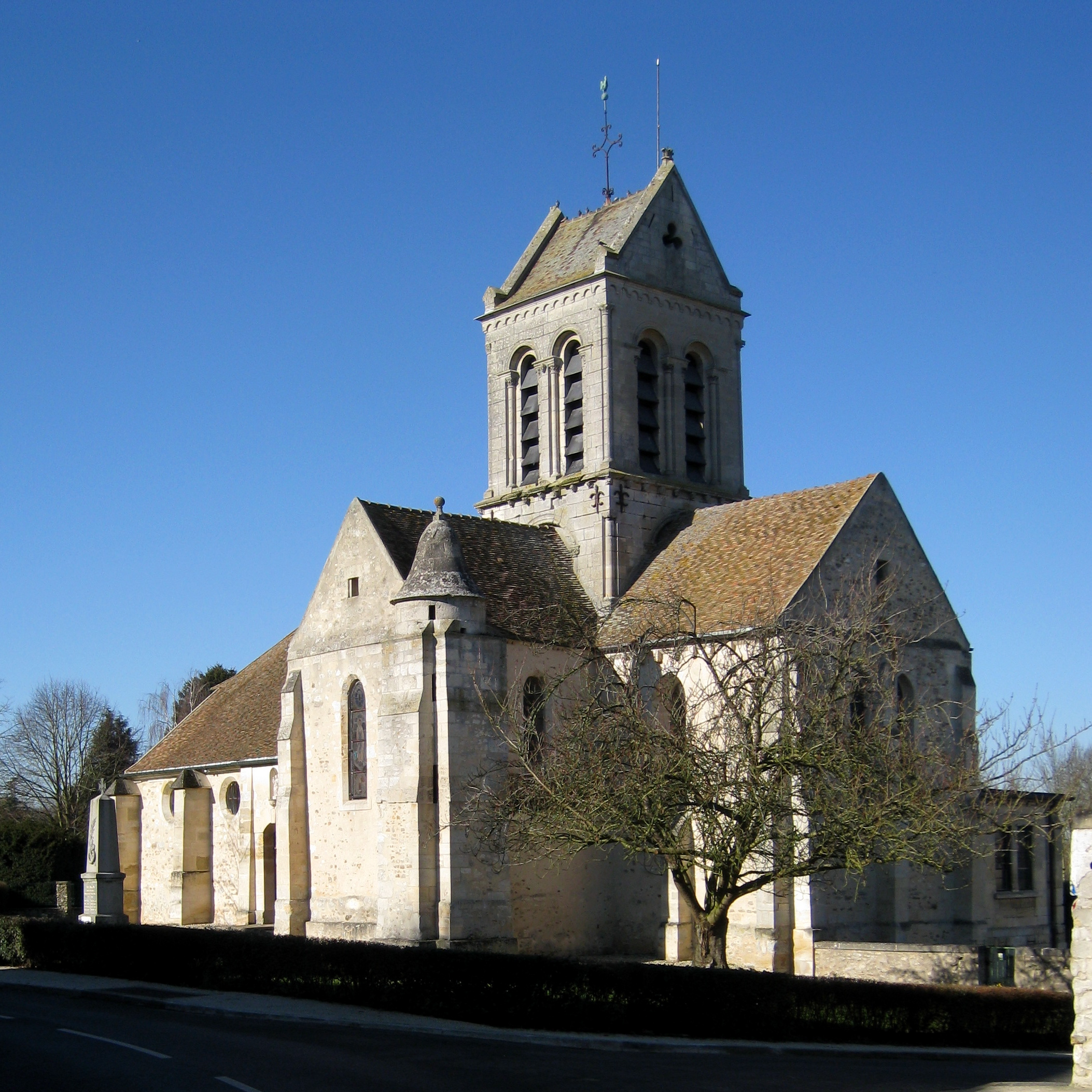 Coté est de l'église Saint-Crépin-et-Saint-Crépinien, Bréançon, Val d'Oise, France